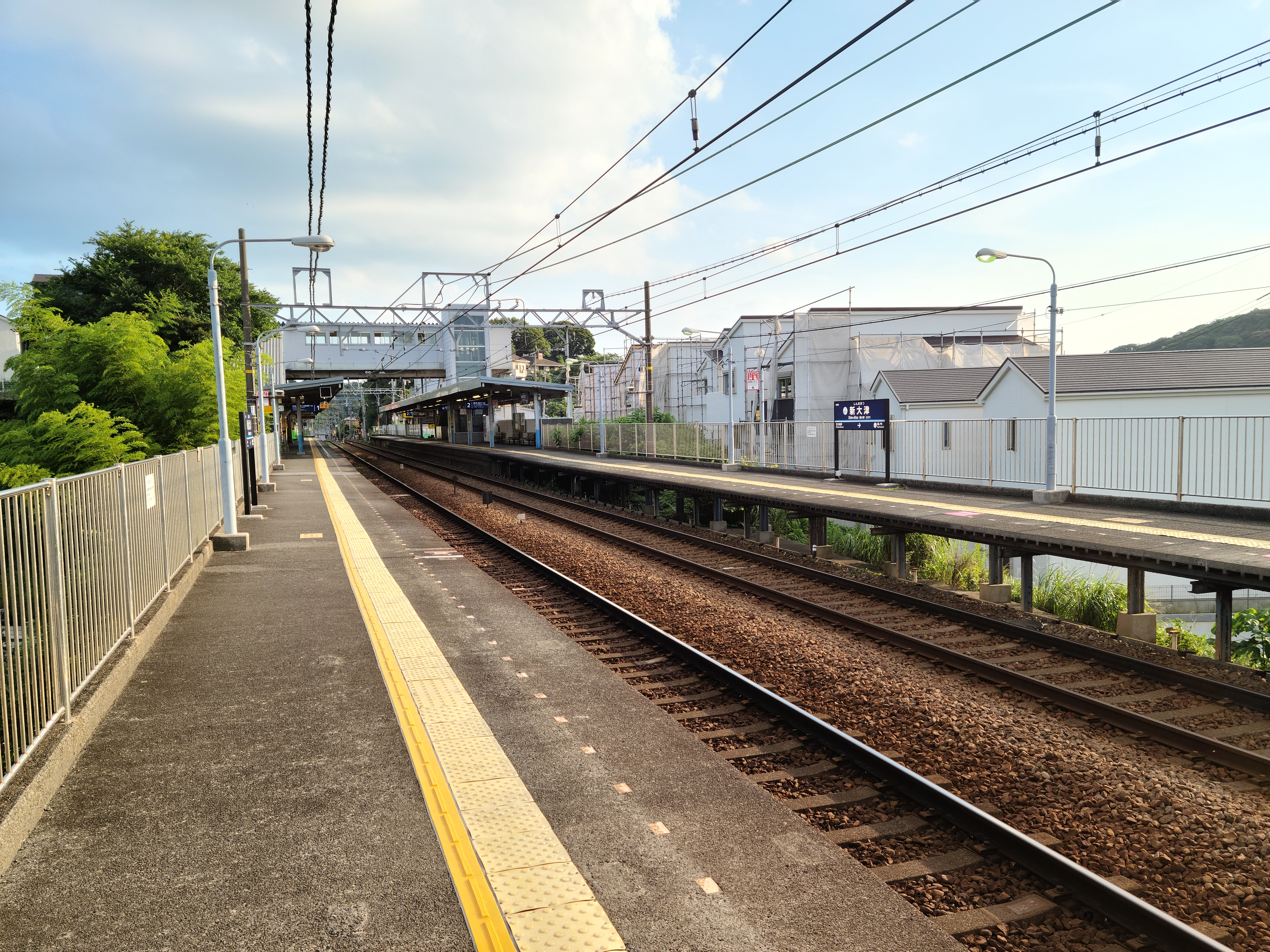 ホームの様子です。